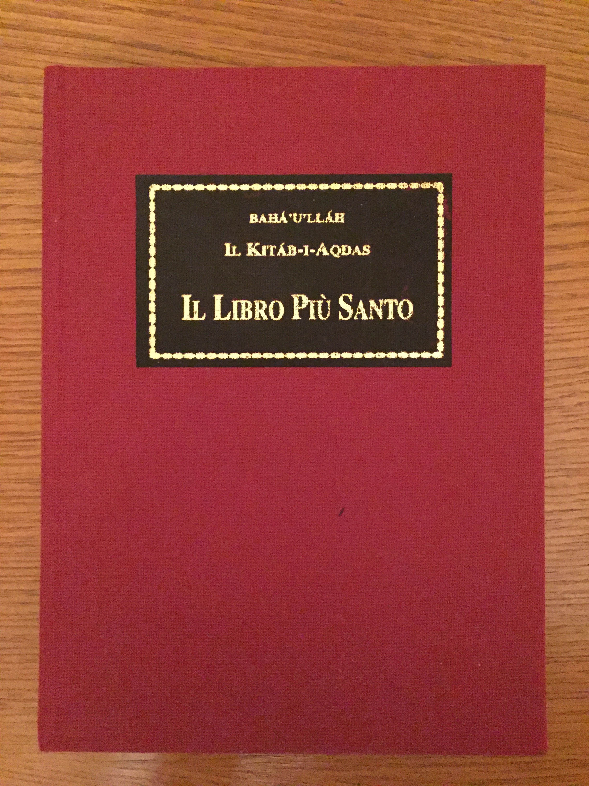 Kitáb-í-Aqdas tradotto in italiano